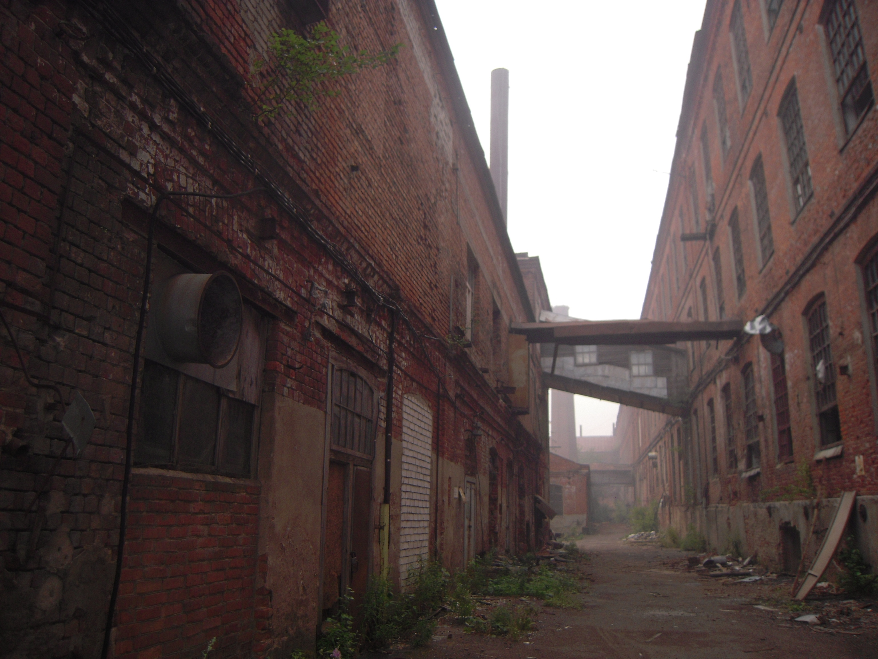 Фабрика «Товарищества Куваевской ситценабивной мануфактуры», Большая Ивановская мануфактура, посл. четв. XIX – нач. XX вв.: отделочный корпус и здание электростанции (Лит. Д); - два вспомогательных корпуса (Лит. А1, А2,А 3, А4, А5 В1, В2, В3); - заводоуправление (Лит. А); -производственный корпус (Лит. Д5); - хозяйственная постройка (Лит. А17); - ткацкий корпус фабрики Ямановского (Лит. Г); - западный склад (Лит Е): проспект Ленина, 19, Иваново, Ивановская область